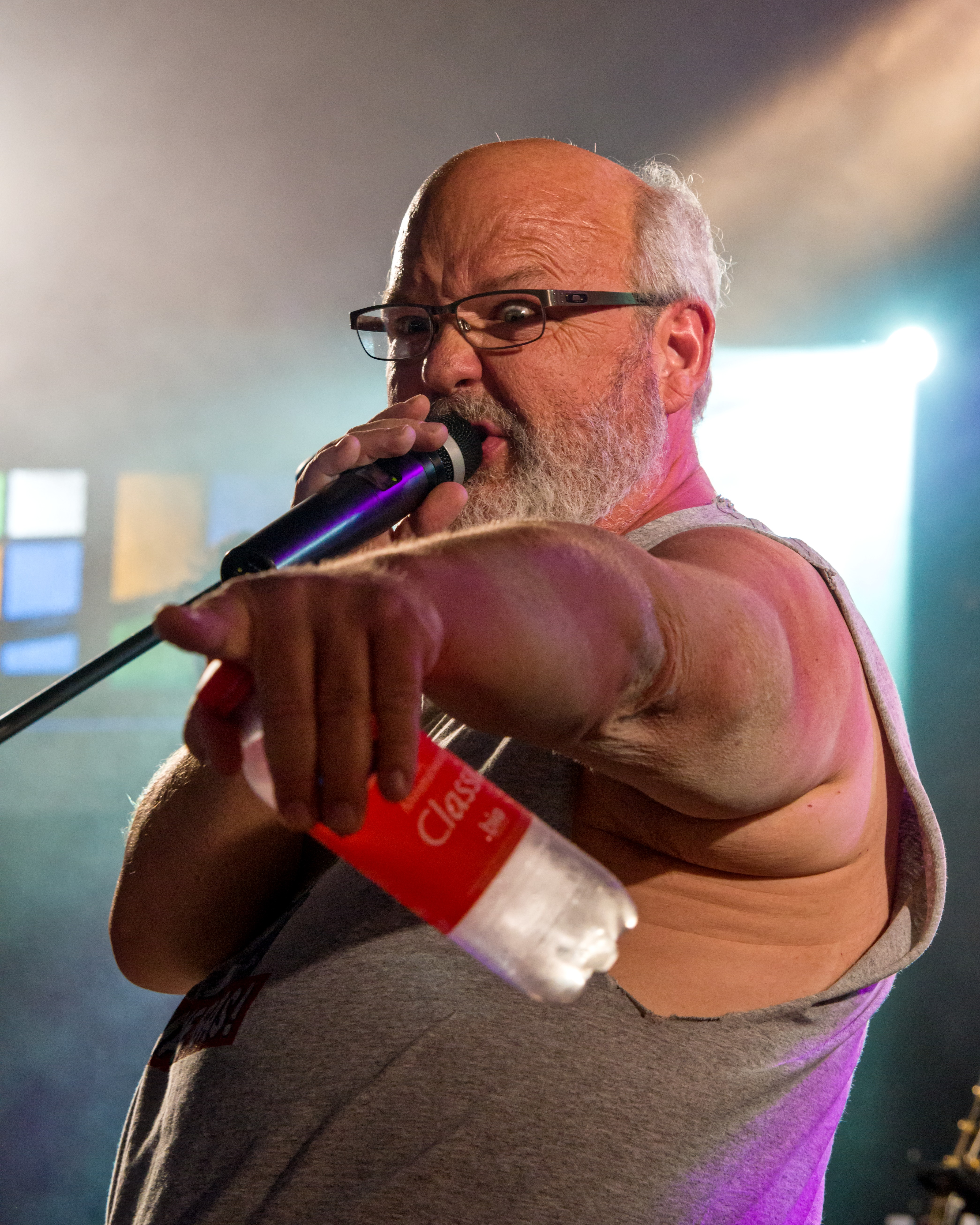 Bilder vom Zelt Musik Festival 2017 in Freiburg im Breisgau Kyle Gass Band